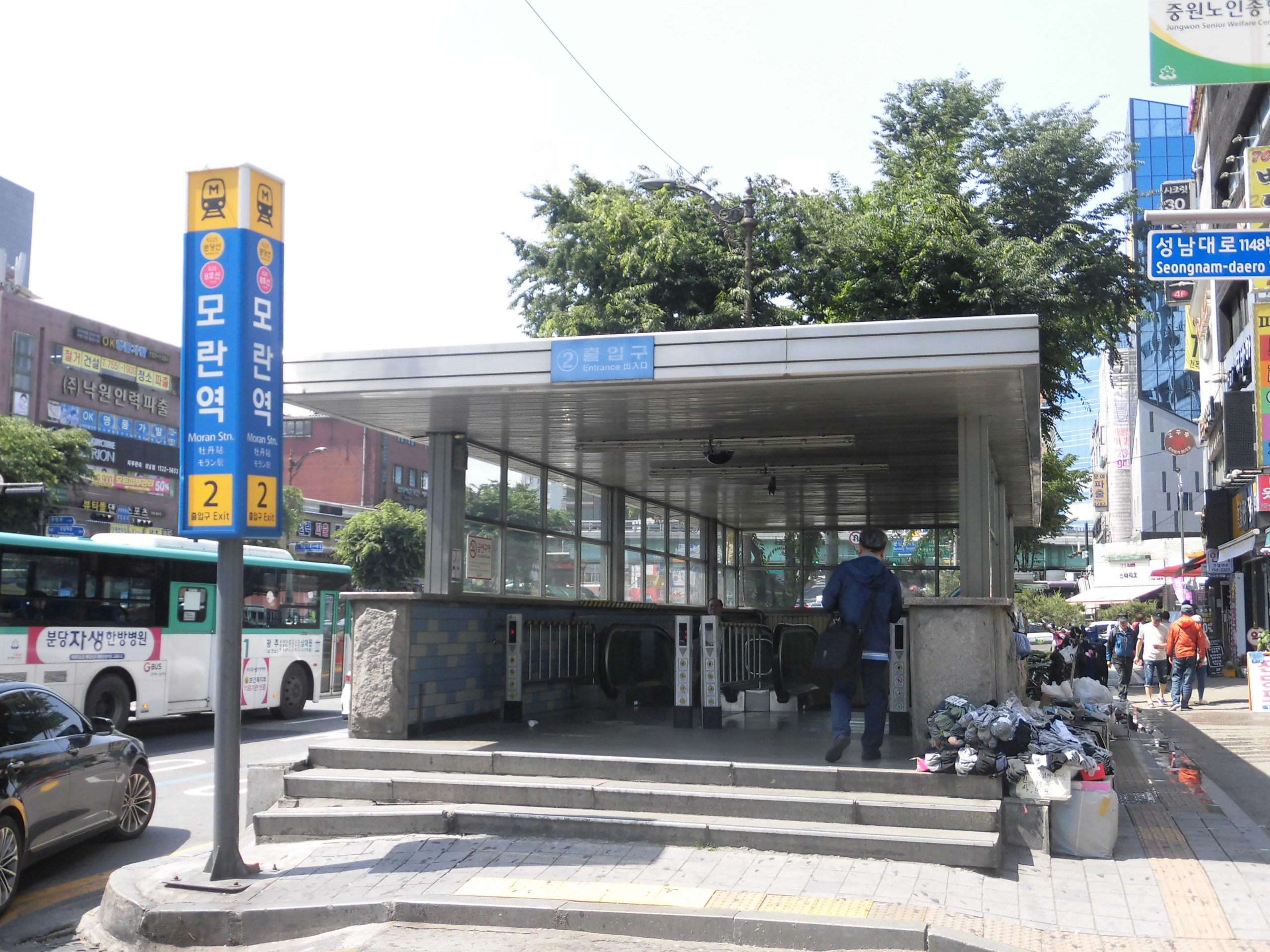 분당선 모란역 2번출구